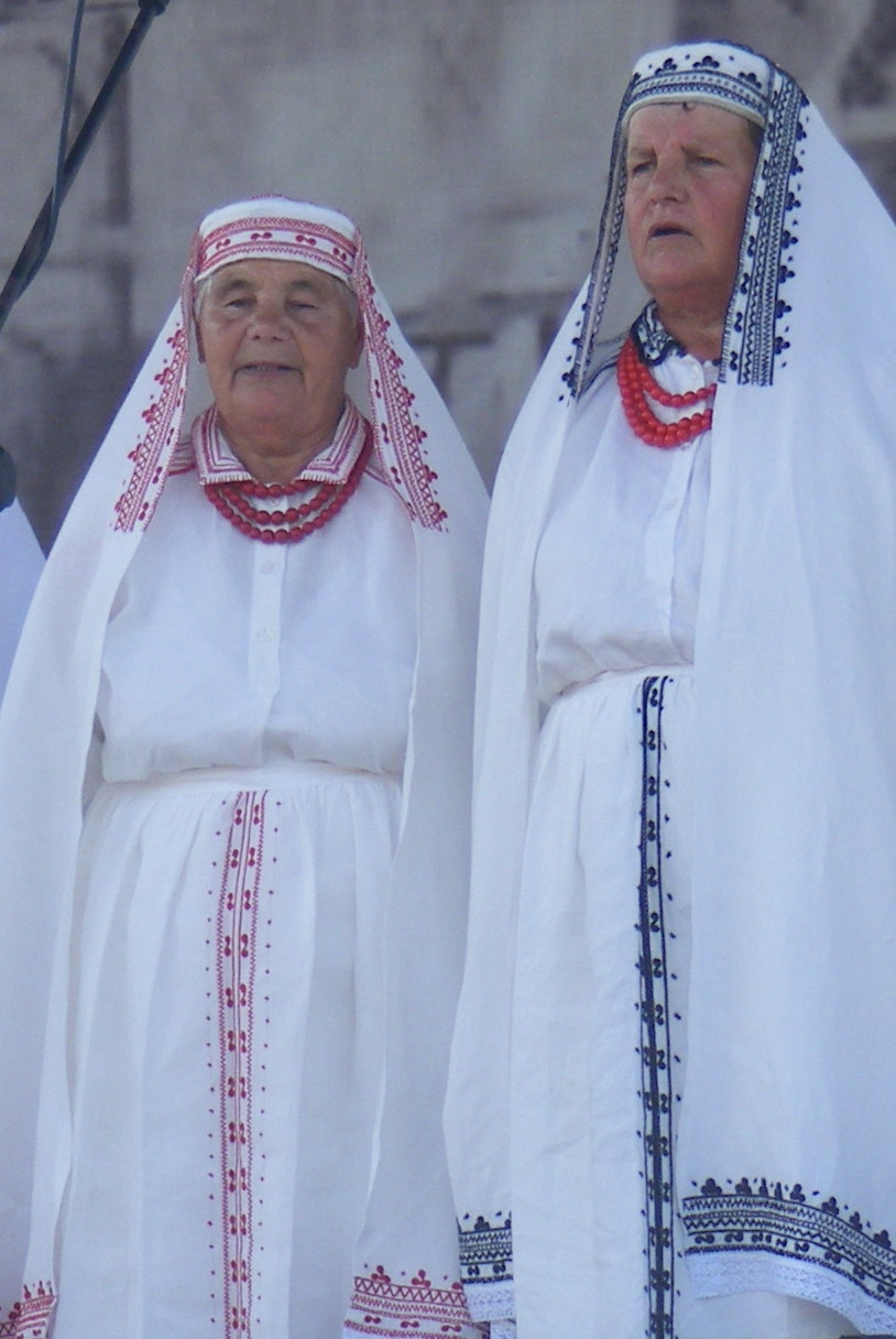 Strój Biłgorajsko-tarnogrodzki - damski